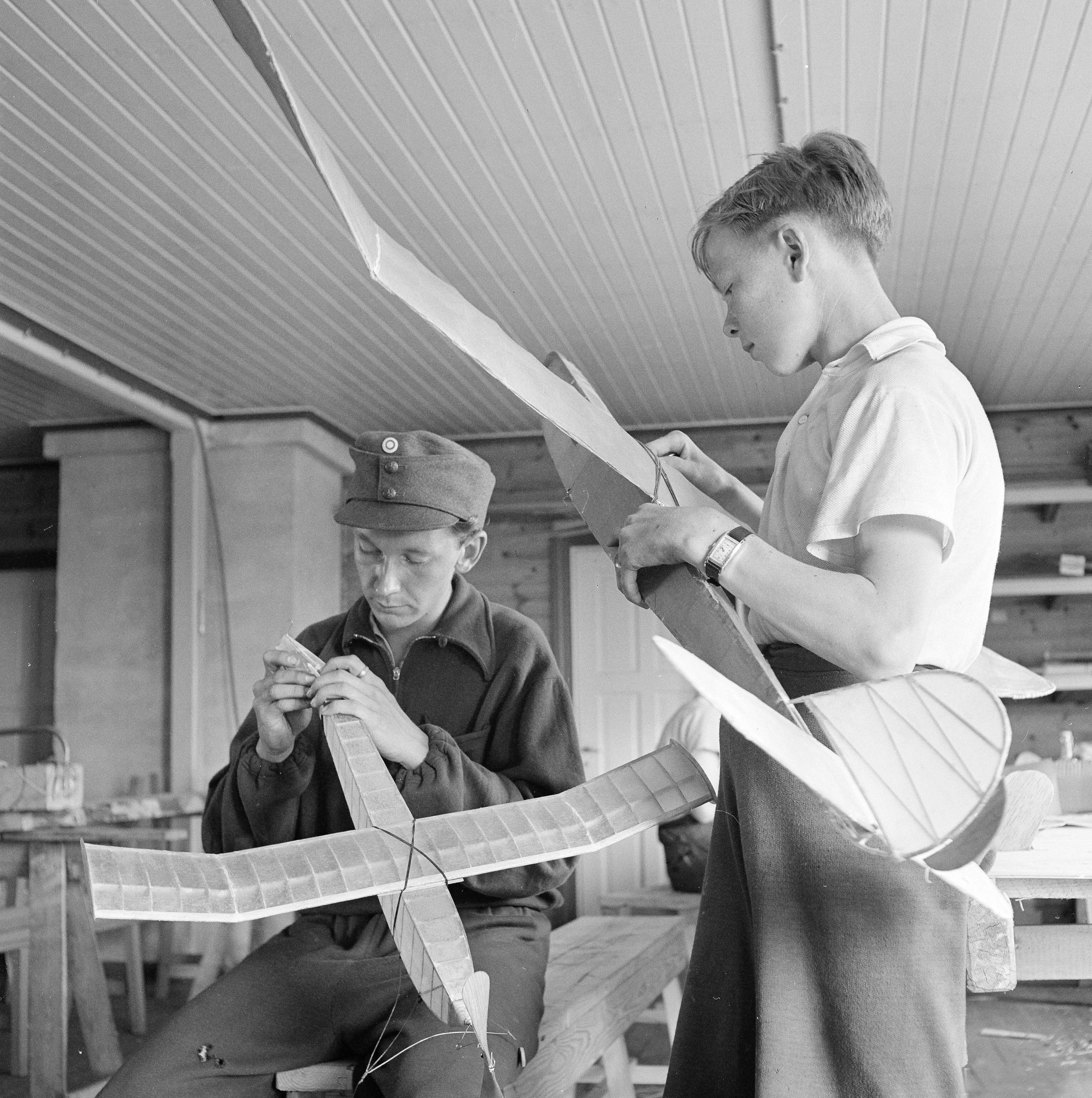 Liidokkeja rakennetaan, Jämijärvi